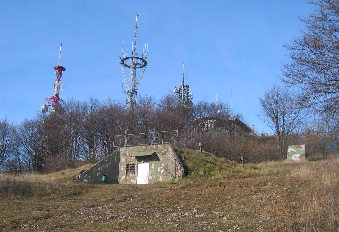 Mountain Krim, Slovenia. by: Sl-Ziga